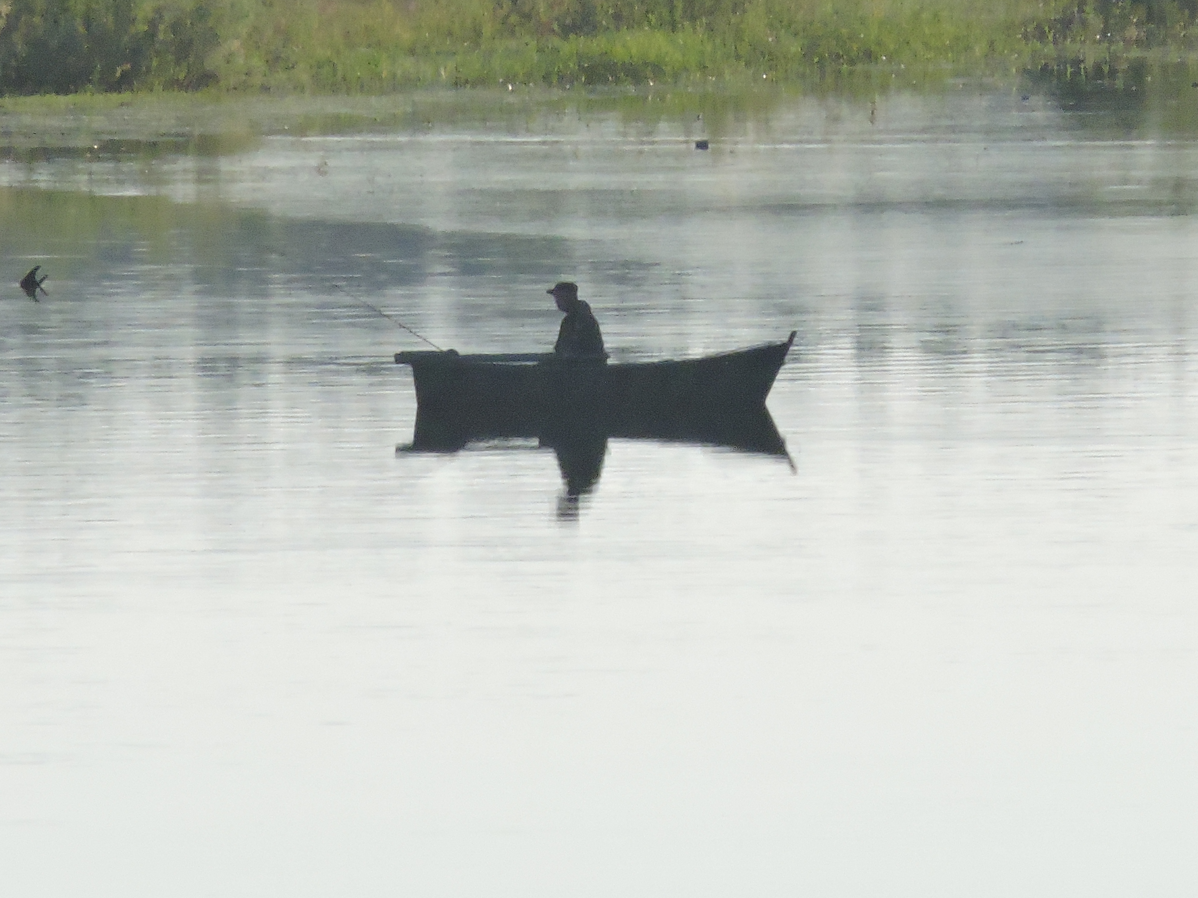 Рыбак на реке Мологе